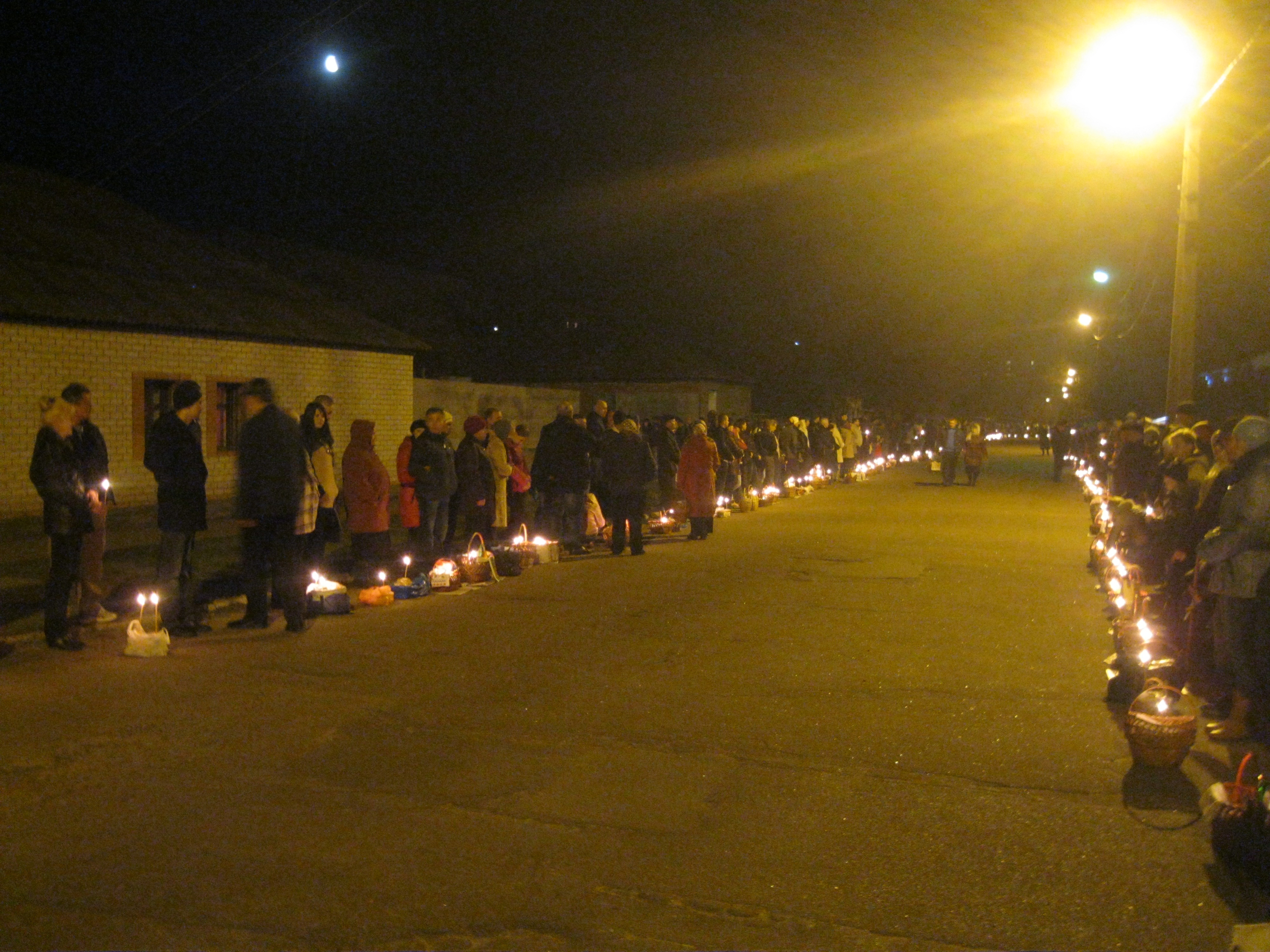 Мешканці міста Олександрія (Кіровоградська область) принесли до православної церкви на освячення великодні страви.